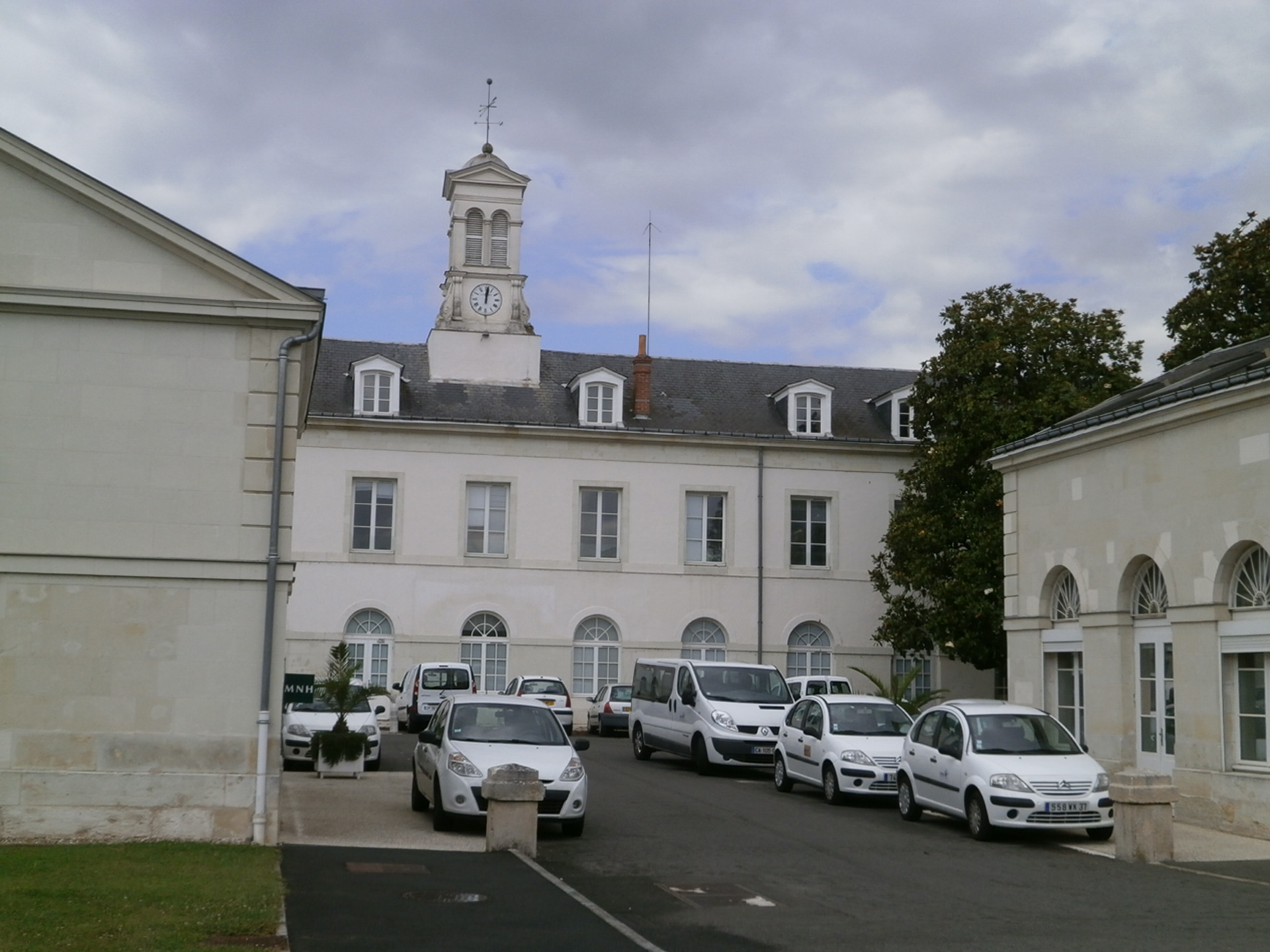 hôpital Bretonneau (Tours) - accueil